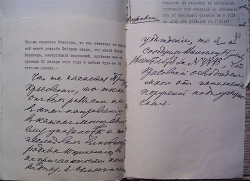 Дело об убийстве Ющинского. Письмо Прокурора Киевской Судебной Палаты Г.Г.Чаплинского Киевскому Губернатору А.Гирсу от 2.11.1911 о "цадиках" Ландау и Этингере, с собственноручной припиской об отстранении Красовского от должности. File about murder of Jushchinsky. The letter of the Public prosecutor of the Kiev Court Chamber G.G.Chaplinsky to the Kiev Governor A.Girs from 2.11.1911 about "tsadiks" Landau and Etinger, with an autographic addition about Krasovsky's discharge from a post.